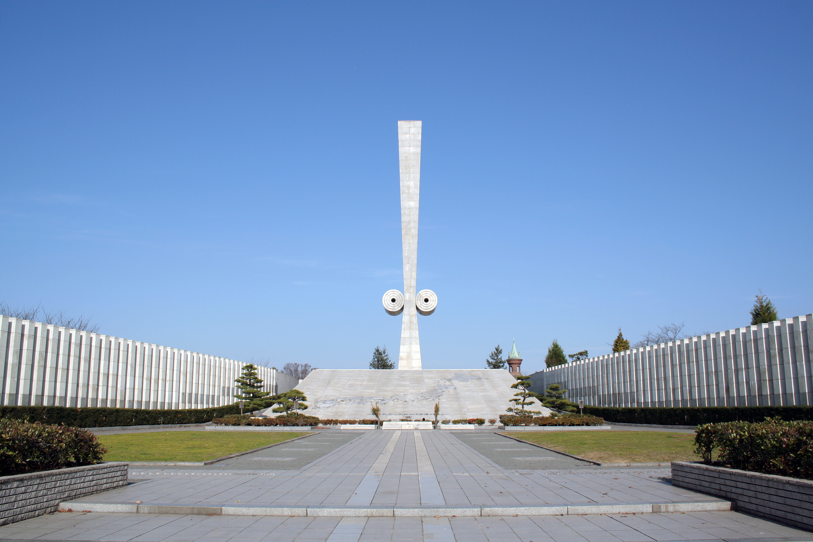 手柄山中央公園にある太平洋戦全国戦災都市空爆死没者慰霊塔。